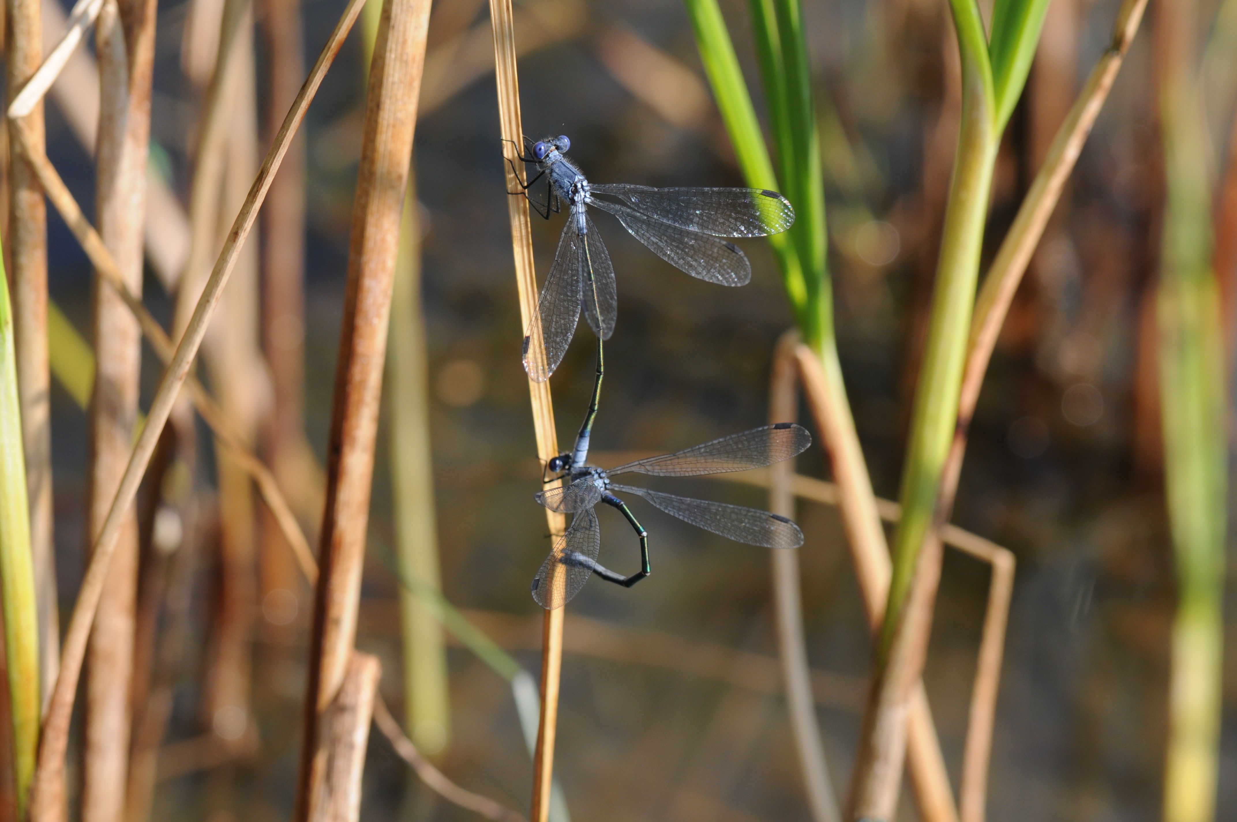 Lestes macrostigma, ponte sur le Scirpe maritime en Camargue, réserve naturelle de la Tour du Valat